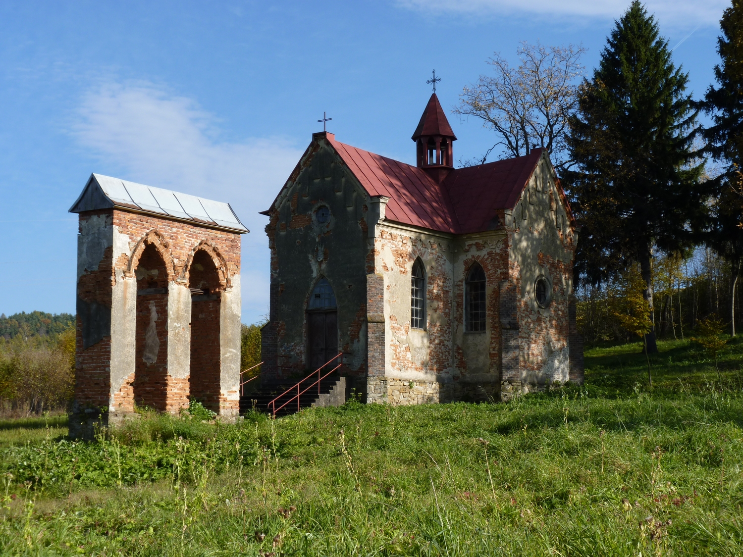 Murowany neogotycki kościółek na greckokatolickim cmentarzu w Wołodzi